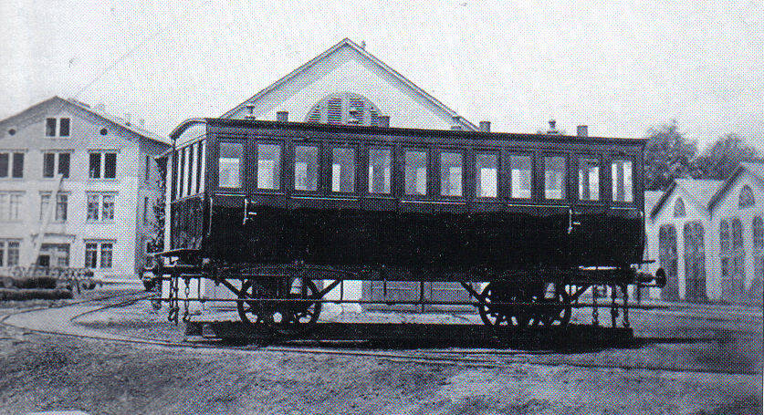 Frankfurt Bockenheim Reifertsche Chaissenfabrik, spätere Frankfurter Waggonfabrik AG, Eisenbahnwaggon eigene Herstellung ca.1872